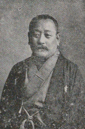 高瀬真卿 日本赤十字社赤十字博物館報 第13号 (日本赤十字社, 1935)